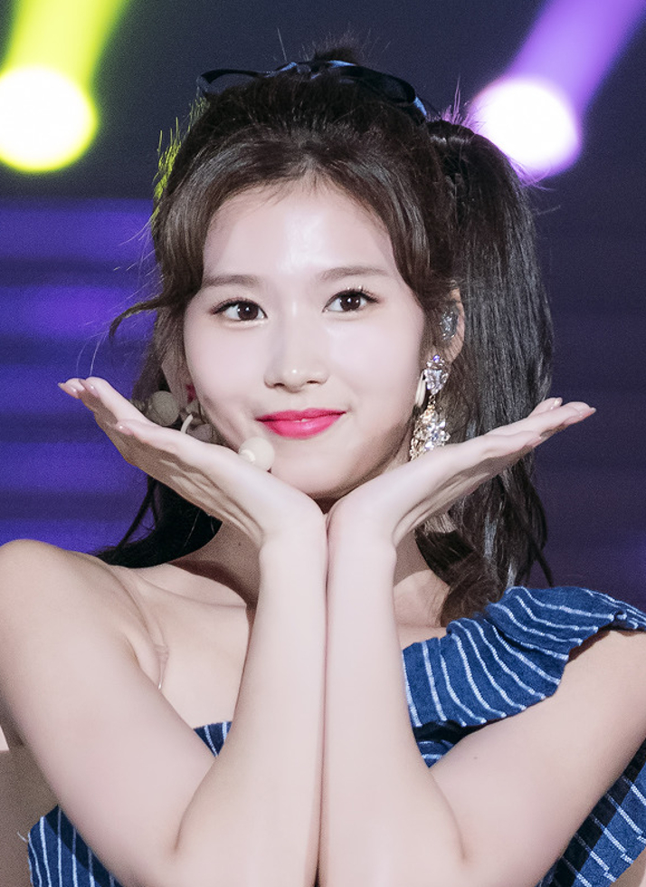 180717 열린음악회 트와이스